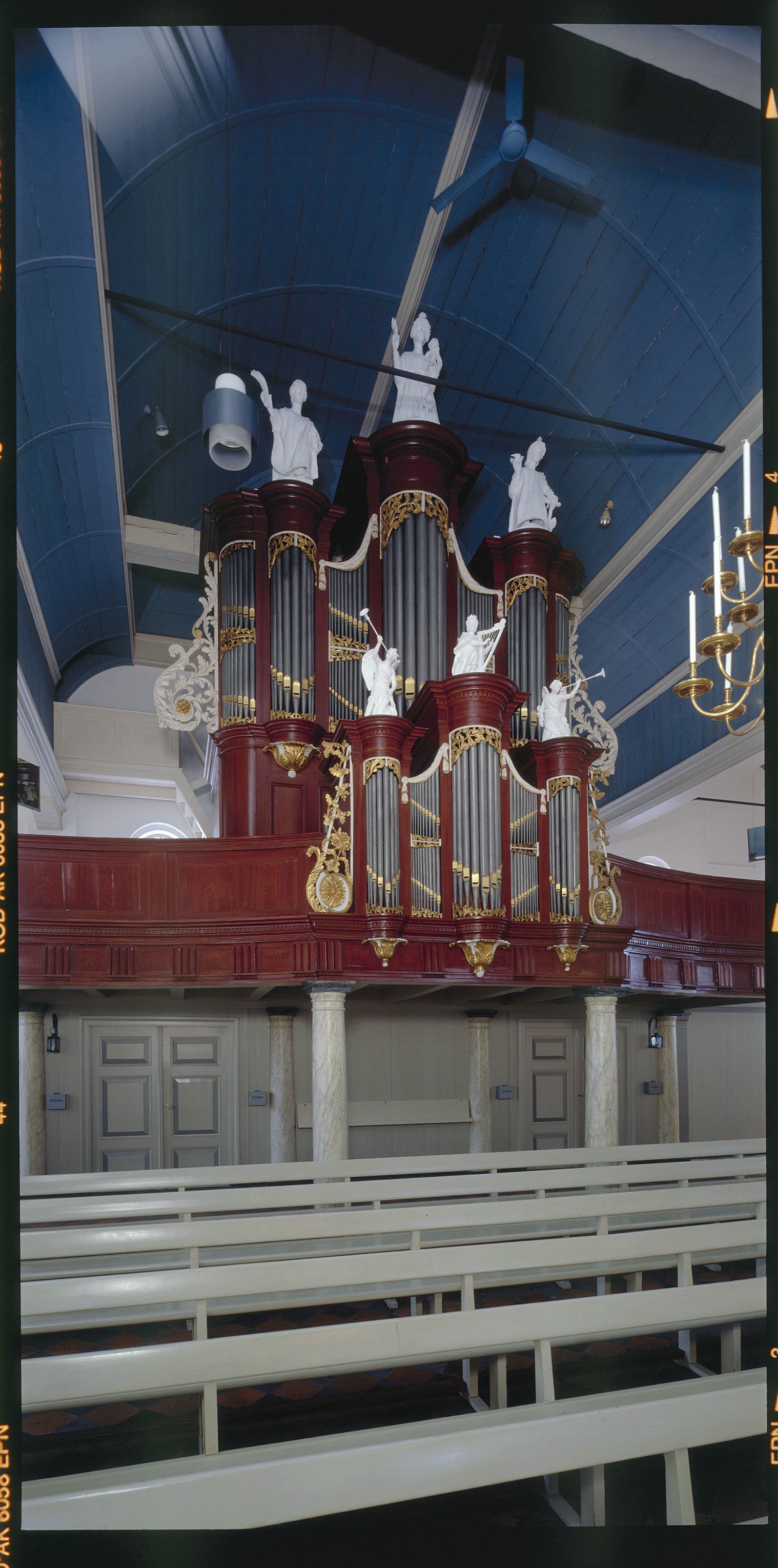 Nederlands Hervormde Kerk: Interieur, aanzicht orgel, orgelnummer 712 (opmerking: Gefotografeerd voor Het Historische Orgel in Nederland 1840-1849)